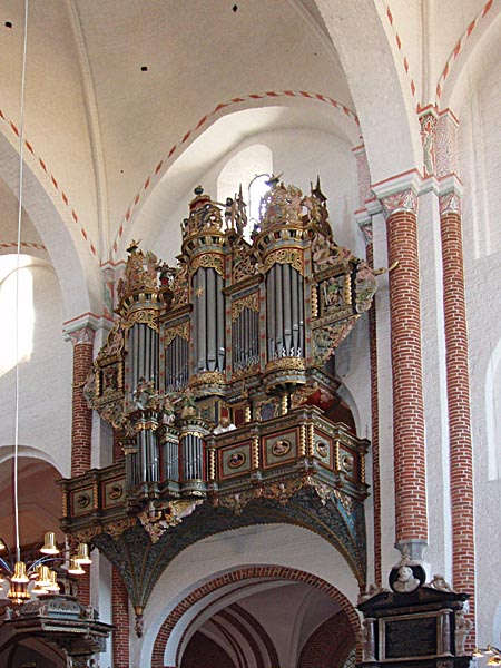 Roskilde Domkirke - Orglet